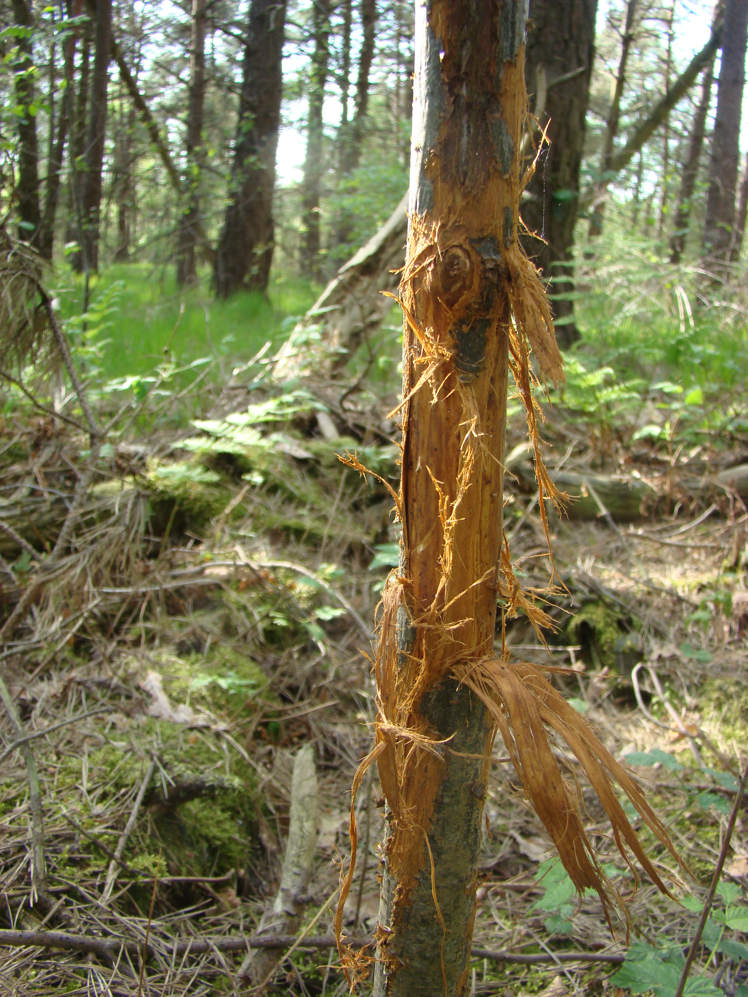 Vogelbeere mit Wildschaden-Verbiss